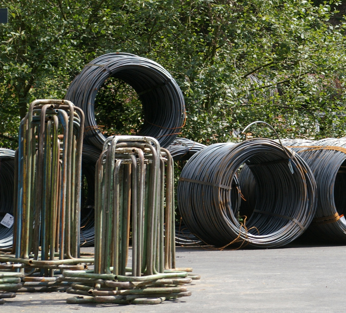 Coils und Coilträger, Drahtfabrik